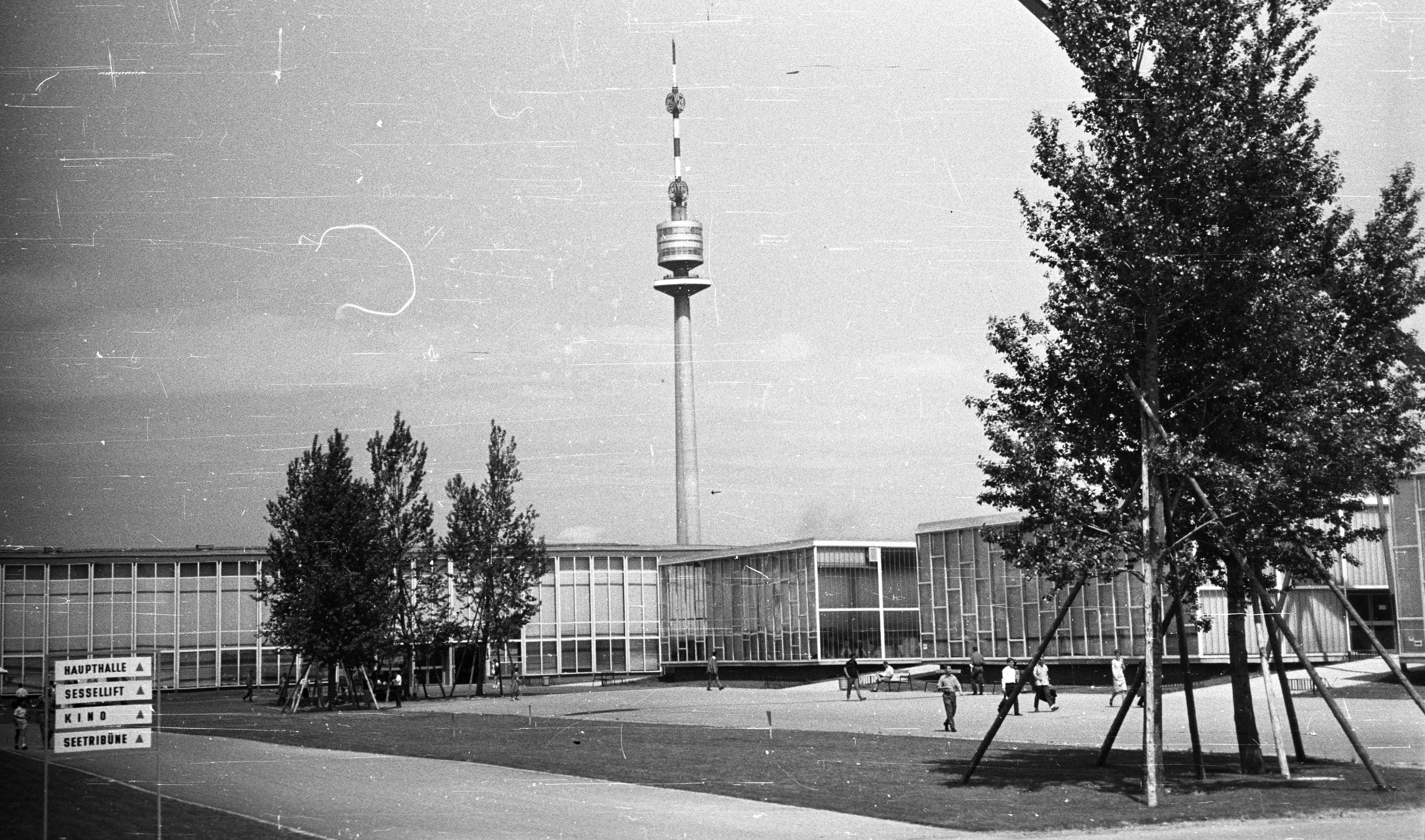 Donaupark,az 1964-es Nemzetközi Kertészeti Kiállítás épületei, háttérben a Donauturm. Location: Austria, Vienna Title: Donaupark,az 1964-es Nemzetközi Kertészeti Kiállítás épületei, háttérben a Donauturm.